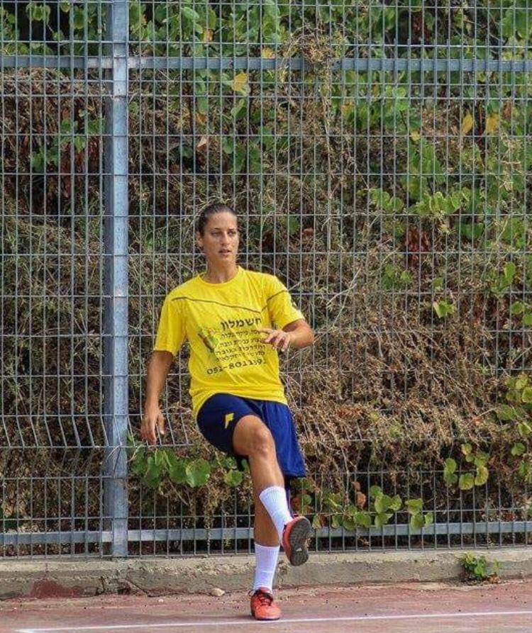 מיה ברקי